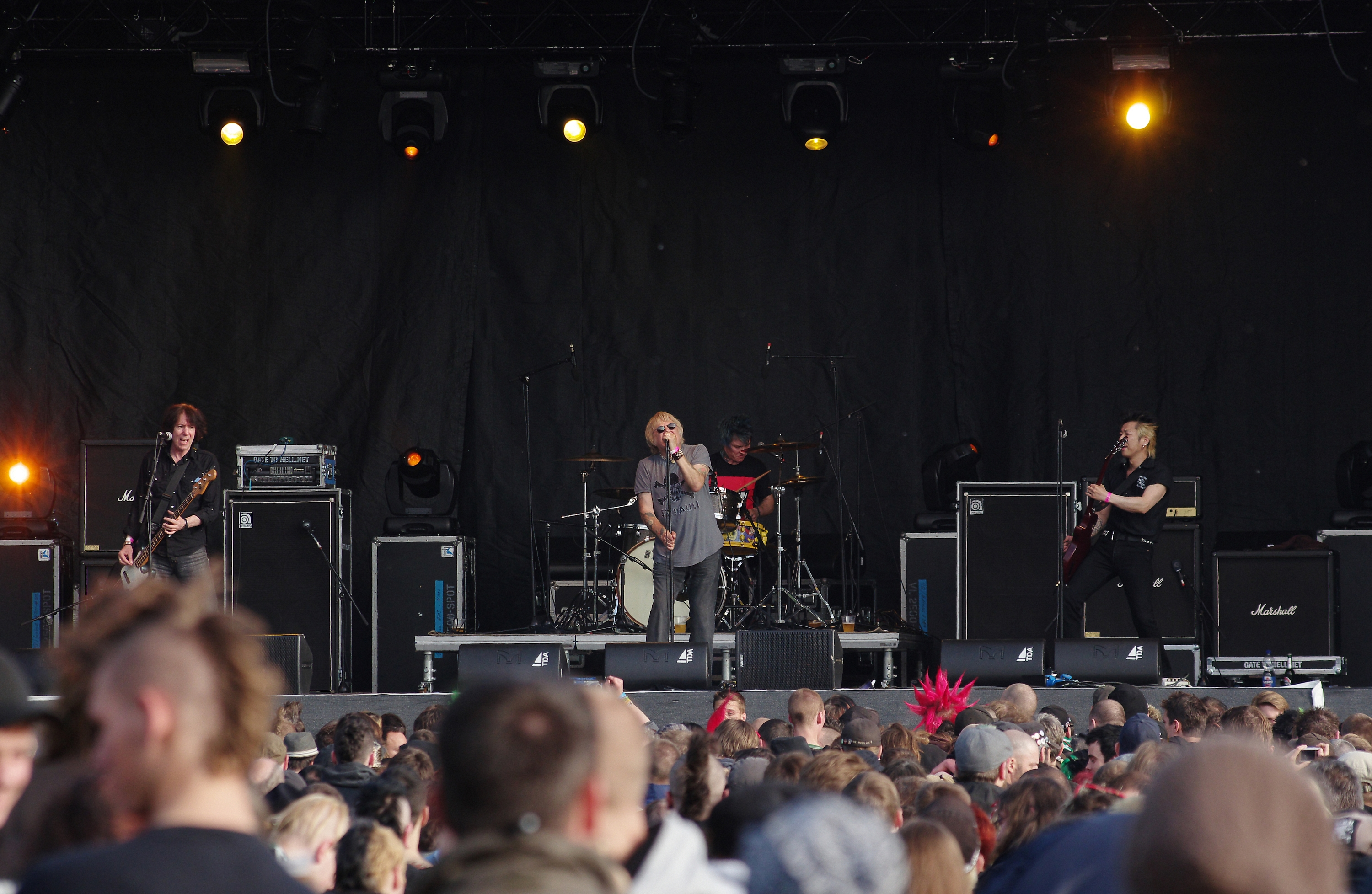 UK Subs beim Ruhrpott Rodeo 2013 in Hünxe.